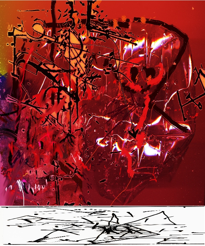 Bild, Dibond Technik